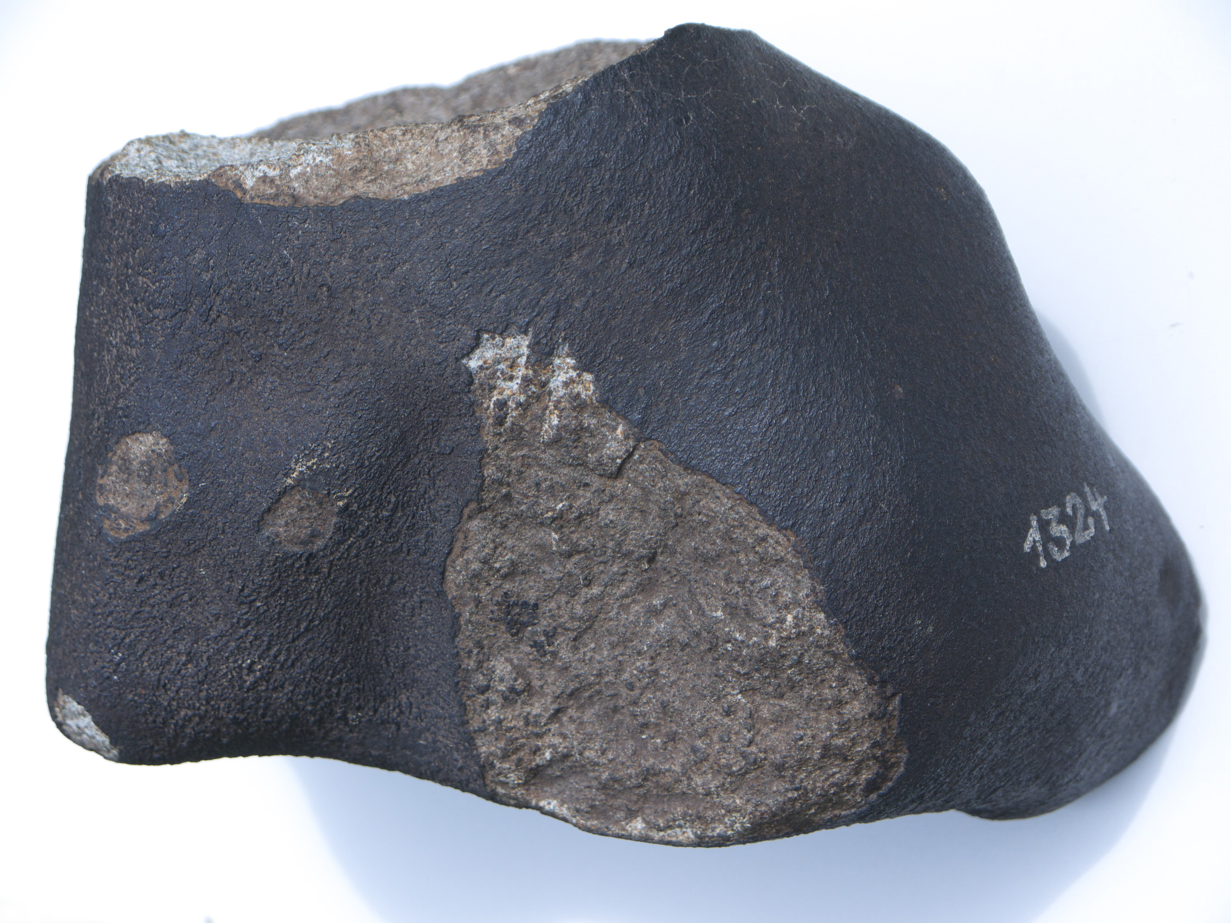 Fragment "Beverbruch" des Meteoriten Oldenburg (1930)